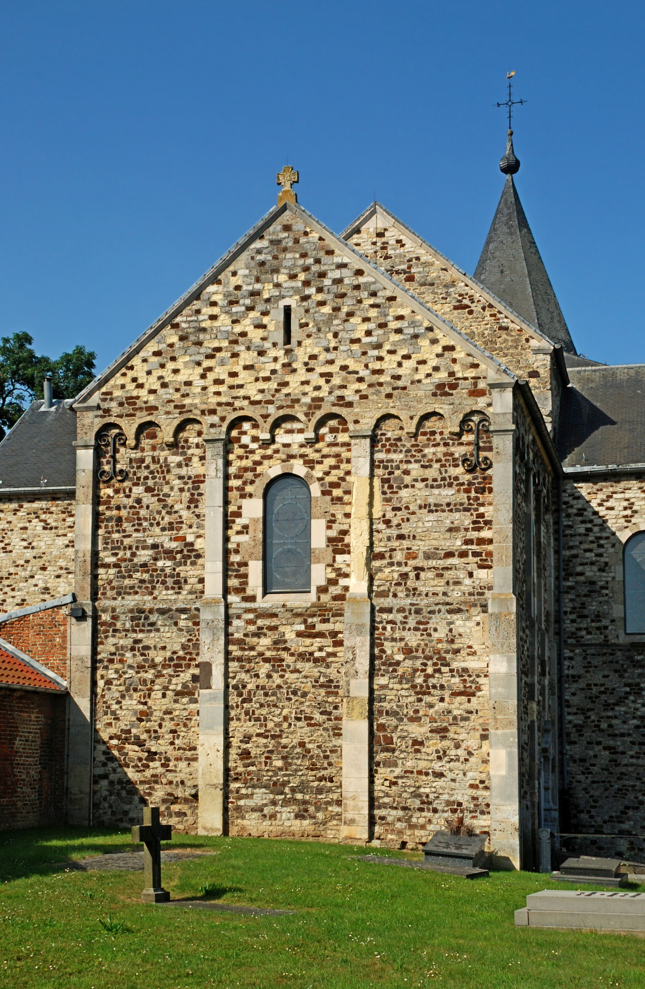 Belgique - Brabant flamand - Église Saint-Hilaire de Bierbeek